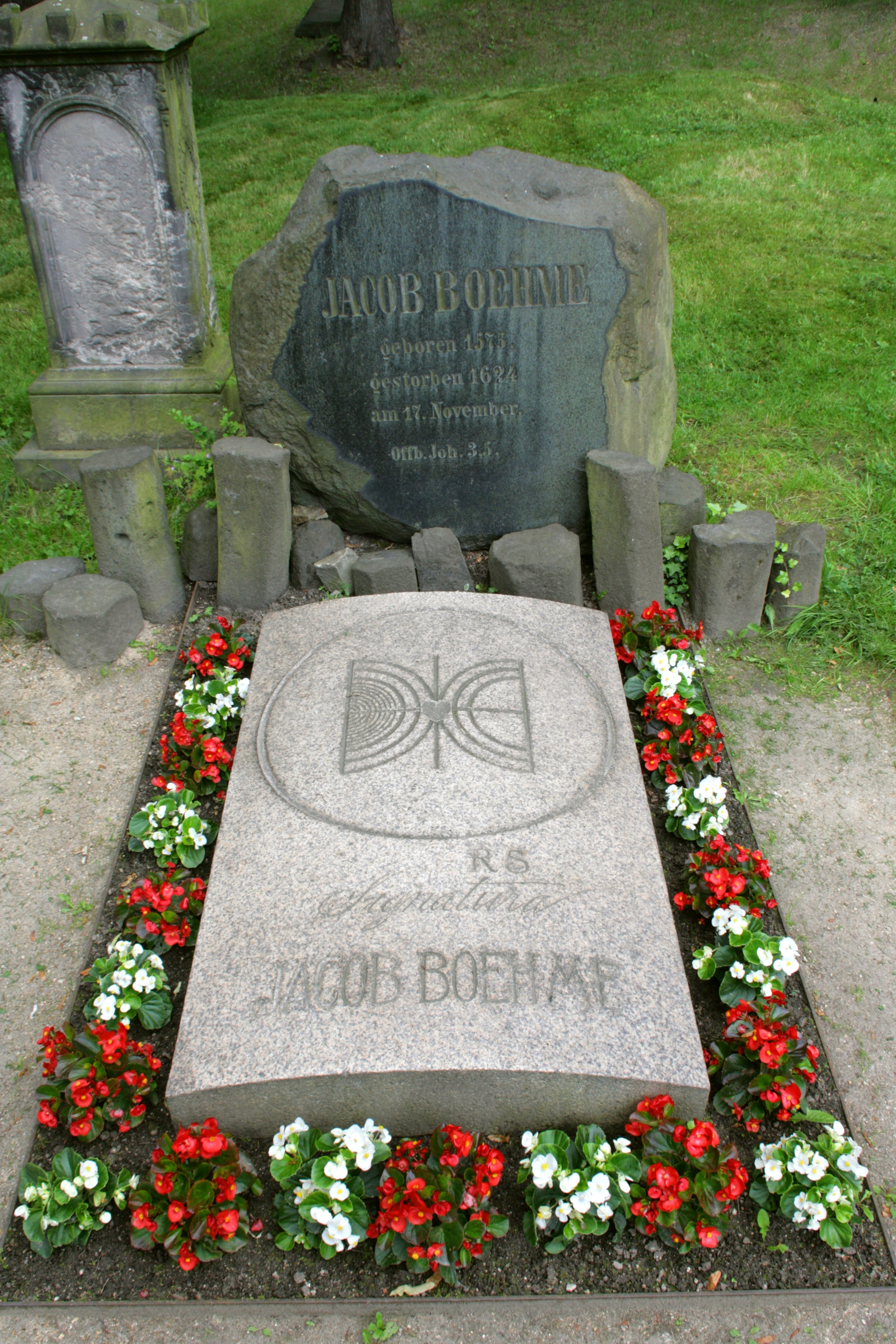 Grab von Jakob Böhme, Nikolaikirchhof, Bogstraße in Görlitz